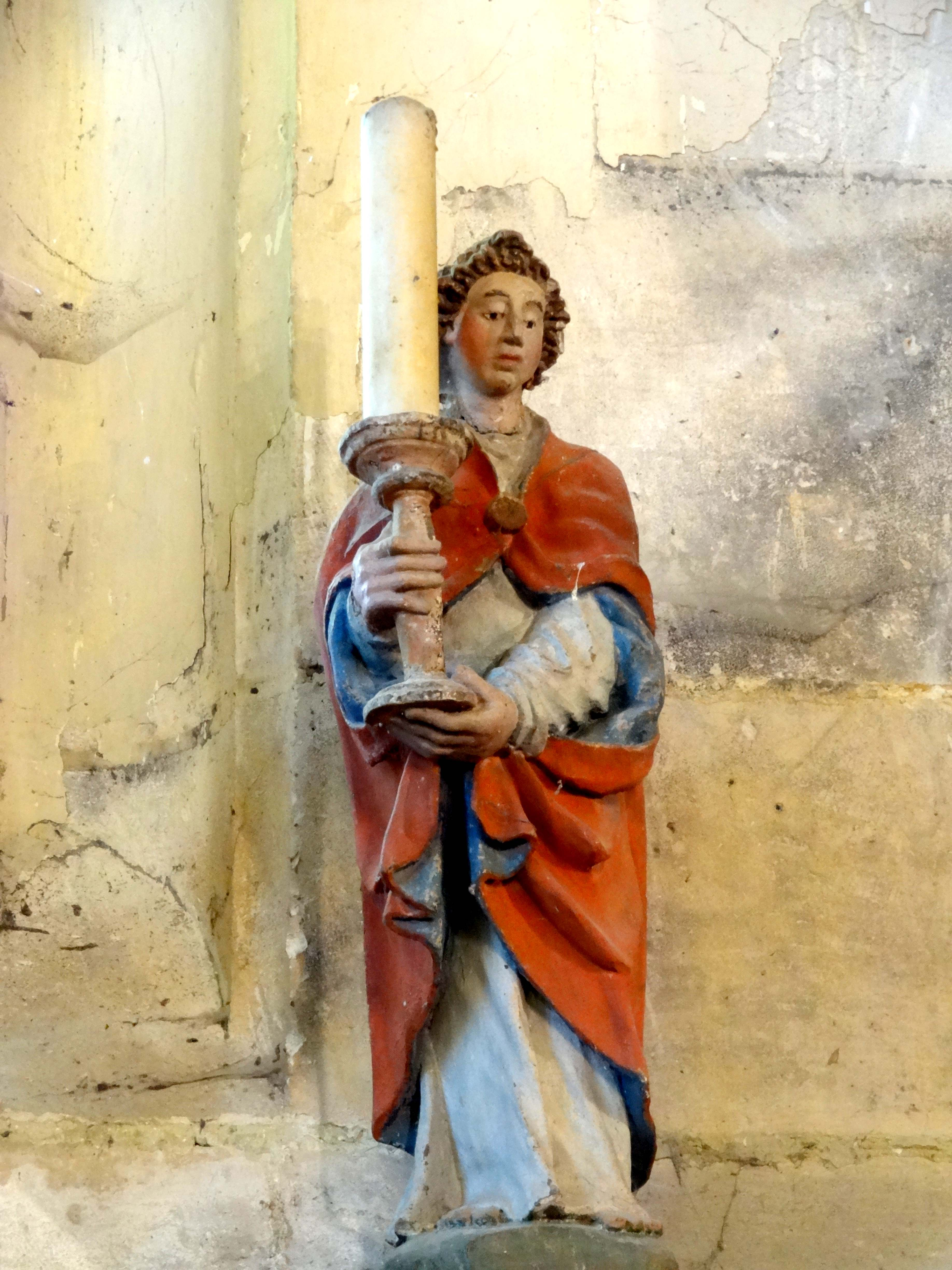 Mobilier de l'église - voir titre.